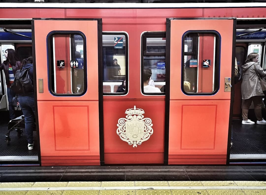 Kulturaĵoj okaze de la 100jariĝo